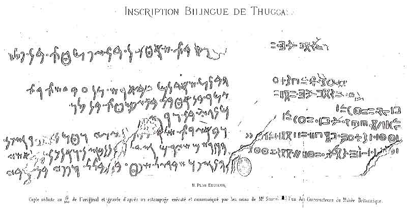 Inscription bilingue (numide e puniq) de Thugga, Dougga, Tunisie